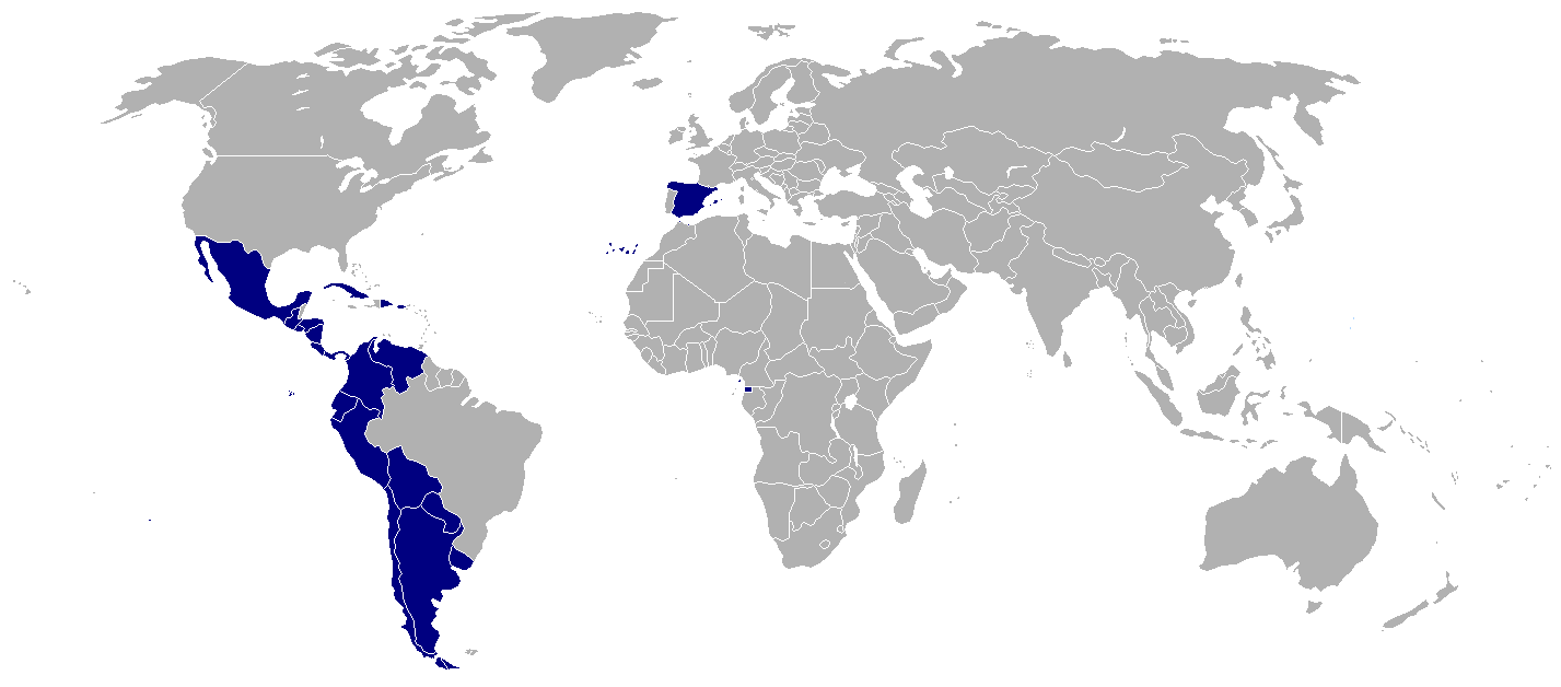 Países donde el español (castellano) es un idioma oficial Countries where Spanish (Castillian) is an official language Pays où l'espagnol (castillan) est une langue officielle Países onde o espanhol (castelhano) é uma língua oficial